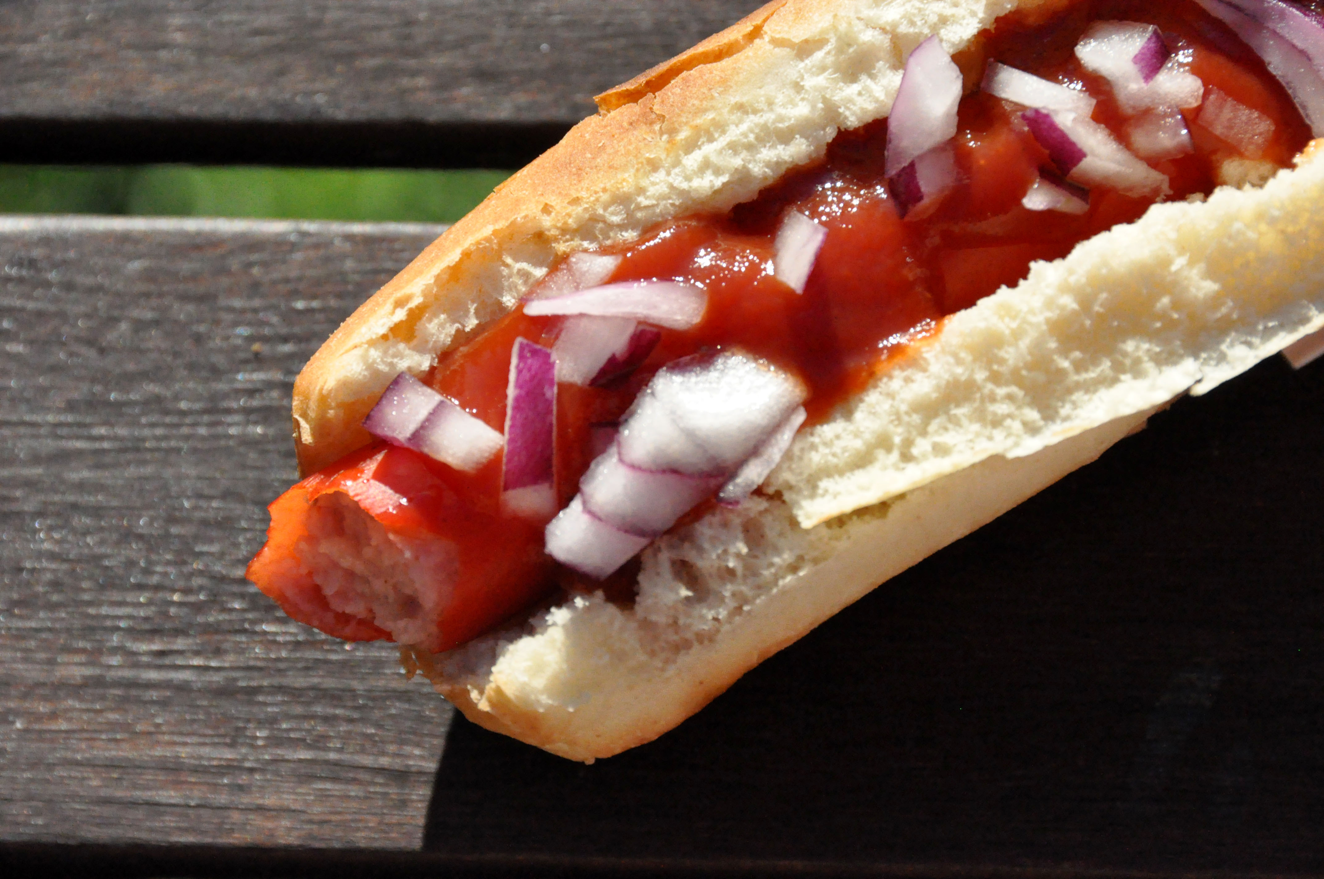 Hotdog